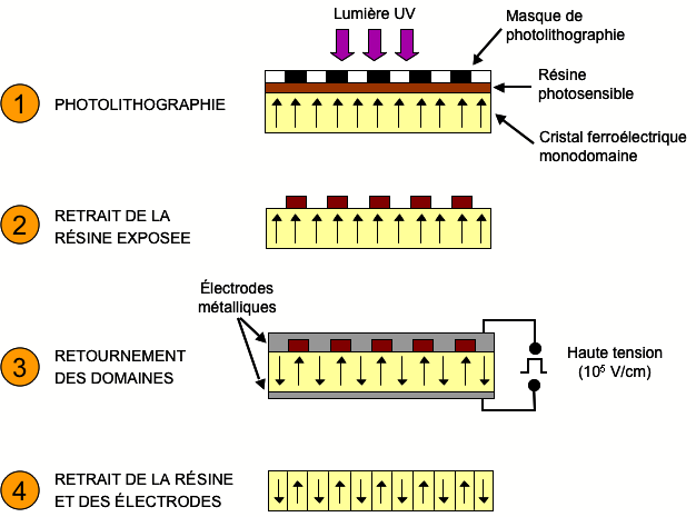 Méthode de retournement périodique des domaines d'un cristal ferroélectrique par application d'un champ électrique intense. Source : personnelle. Licensing Catégorie:Schéma de physique